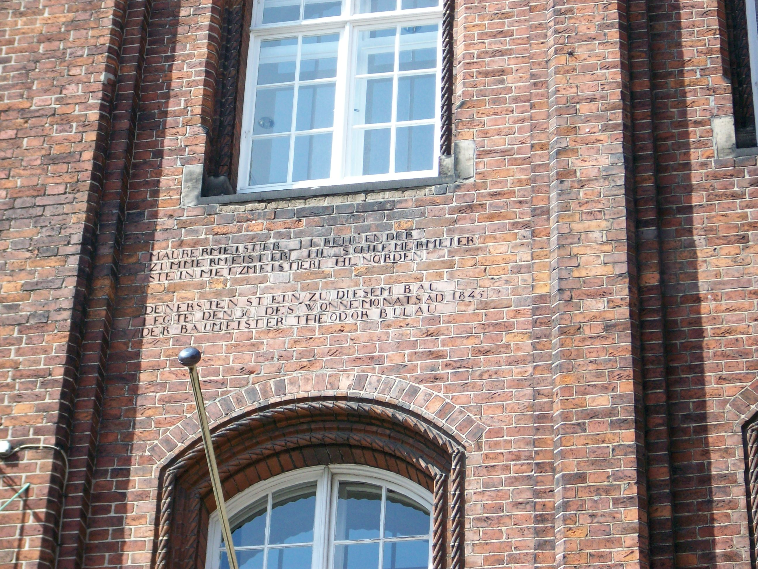 Fassadeninschrift mit den Namen der Erbauer des Hauses der Patriotischen Gesellschaft Hamburg: Maurermeister I Rehlender Zimmermeister HL Schlemermeier Steinmetzmeister HL Norden Den ersten Stein zu diesem Bau legte den 30 des Wonnemonats AD 1845 der Baumeister Theodor Bülau This is a photograph of an architectural monument.